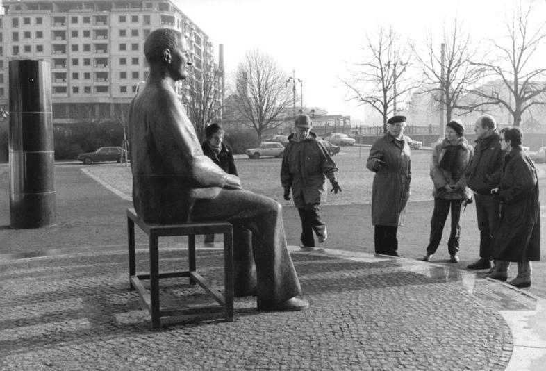 ADN-ZB-Uhlemann-14.2.88-Berlin: Das Brecht-Denkmal vor dem Gebäude des Berliner Ensembles.